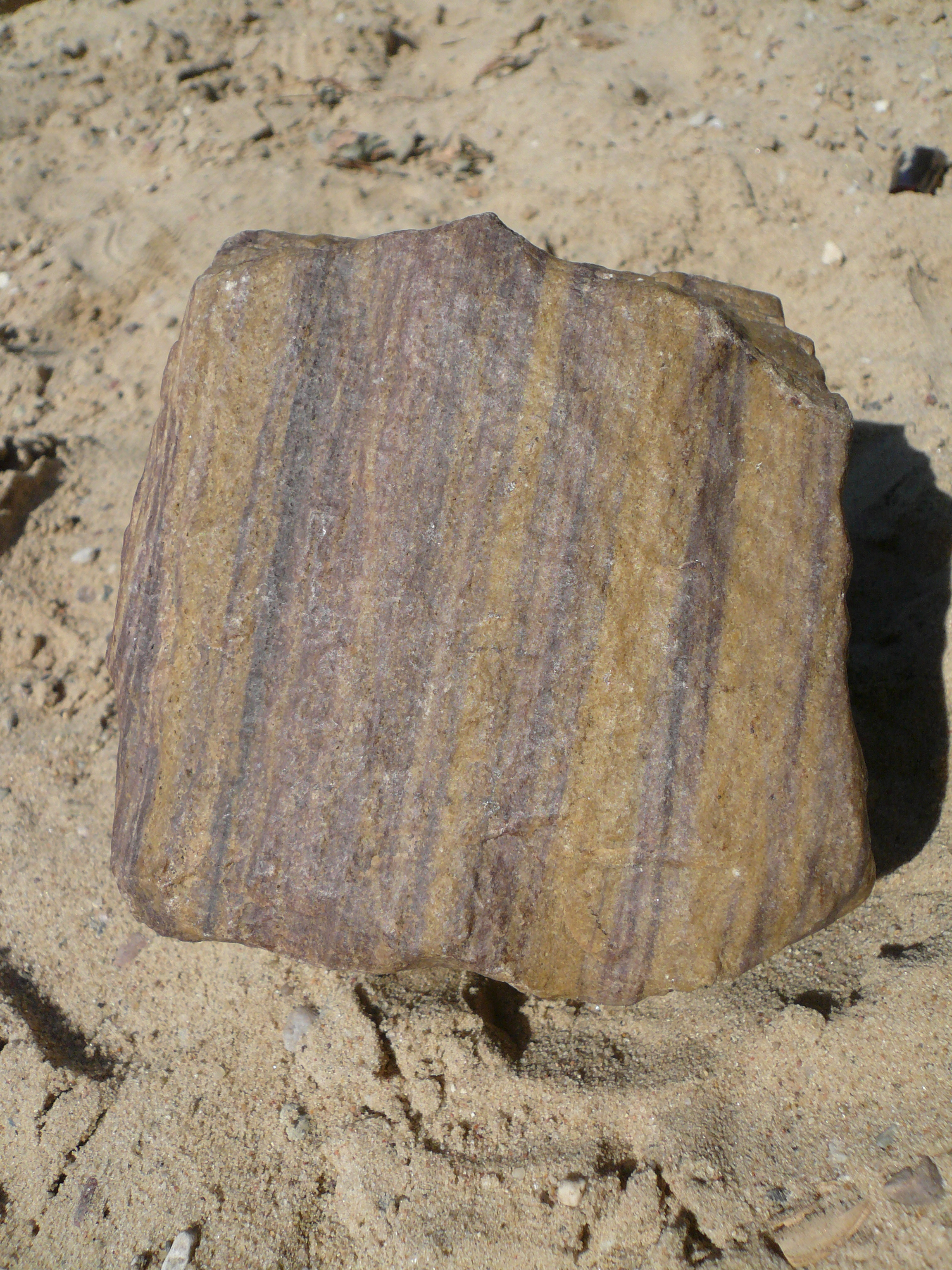 Sandstone from Kalmarsund, Sweden